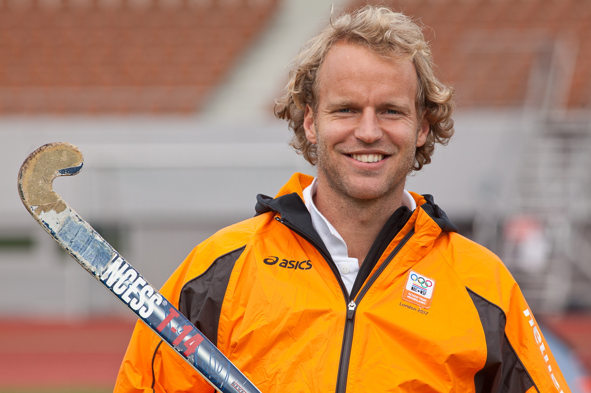 Nederlands veldhockeyspeler